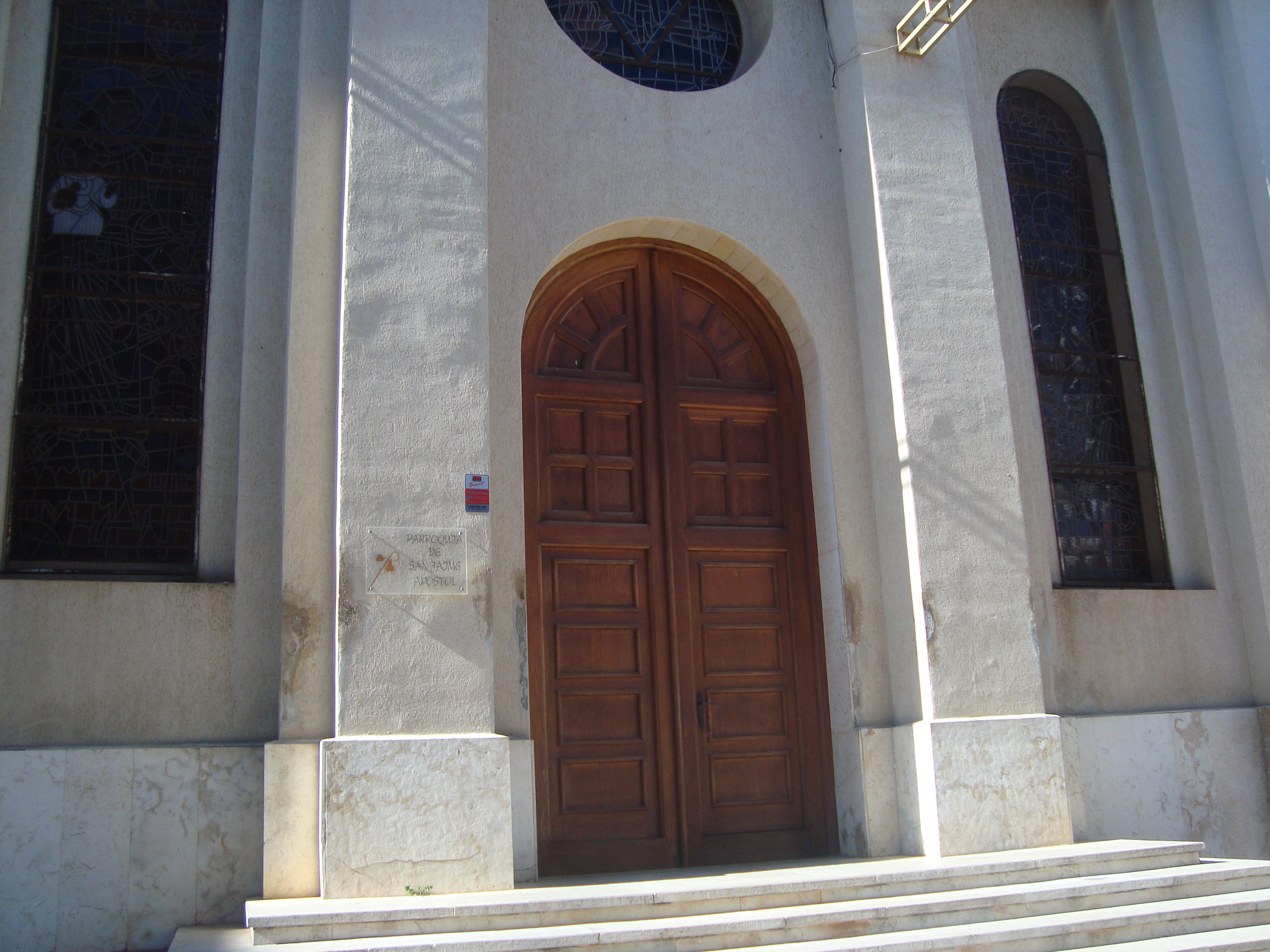 Església parroquial de Sant Jaume (Orpesa) 05.085-002.